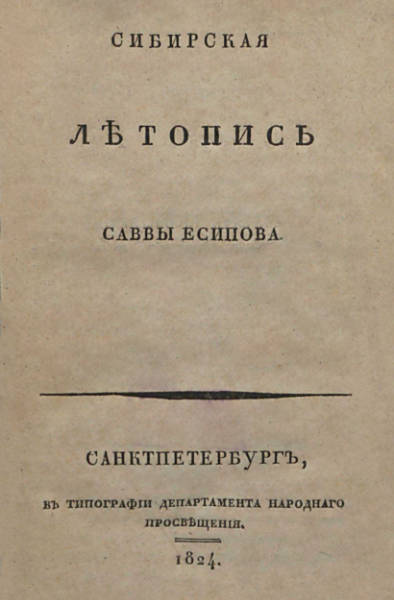 Сибирская лѣтопись Саввы Есипова, заглавная страница